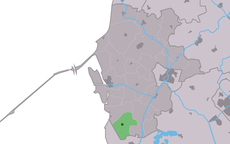 Kaartsje fan himrik fan Ferwâlde